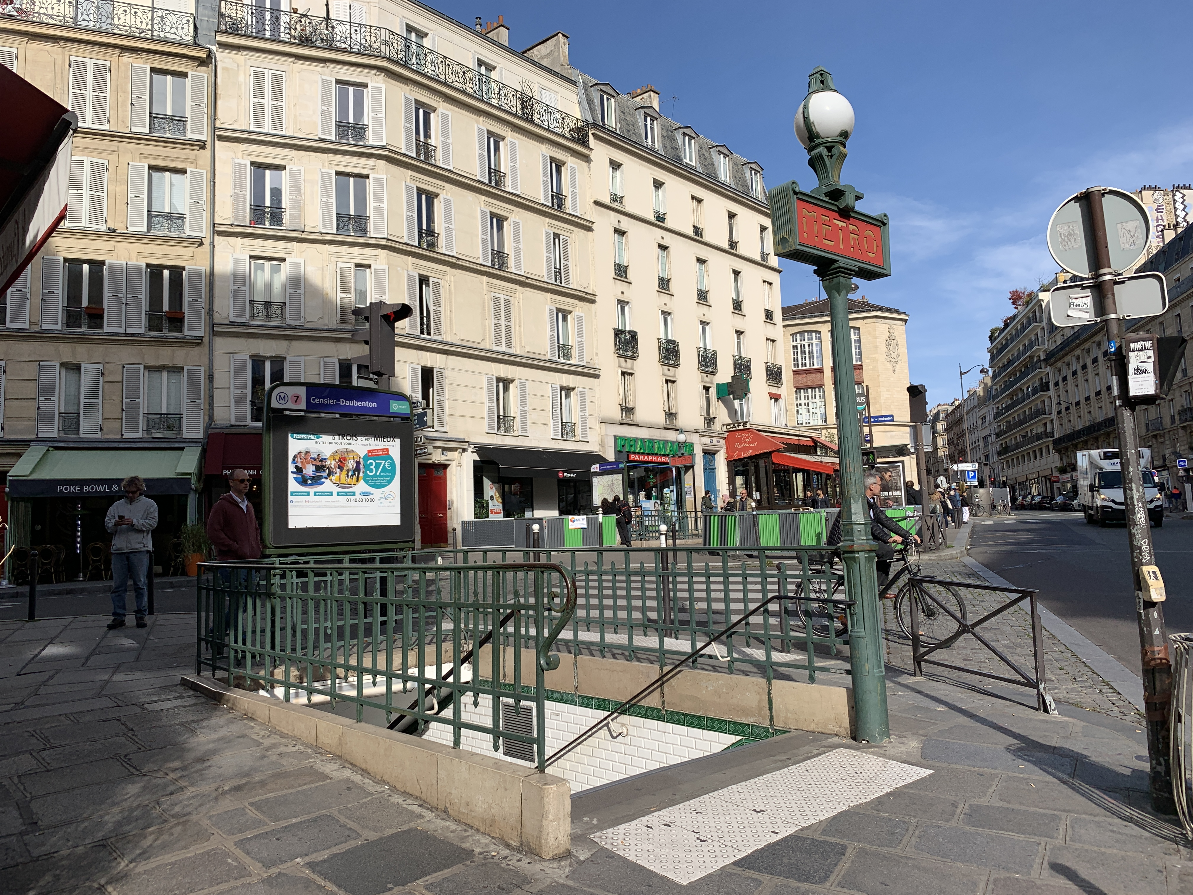 Entrée de la station de métro Censier Daubenton, Paris.